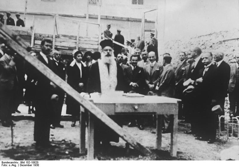 Deutsche Industrie legt in Griechenland ein Fernsprechnetz an. Feierliche Grundsteinlegung für das neue Fernsprechamt in Piraeus/Griechenland. Die Grundsteinlegung fand in Gegenwart des Verkehrsministers Karapanajotis, des Bürgermeisters Panajatopoulos und anderer prominenter Behördenvertreter statt. Information added by Wikimedia users.